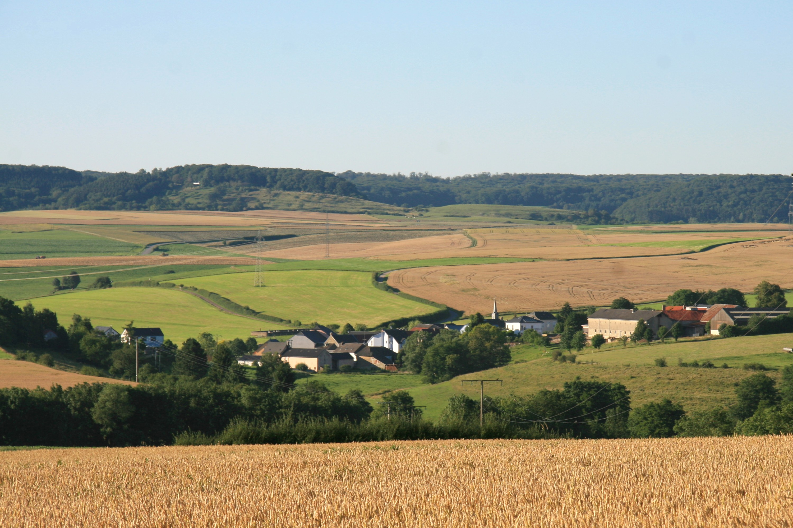 Vue op Buddeler - user Ioni